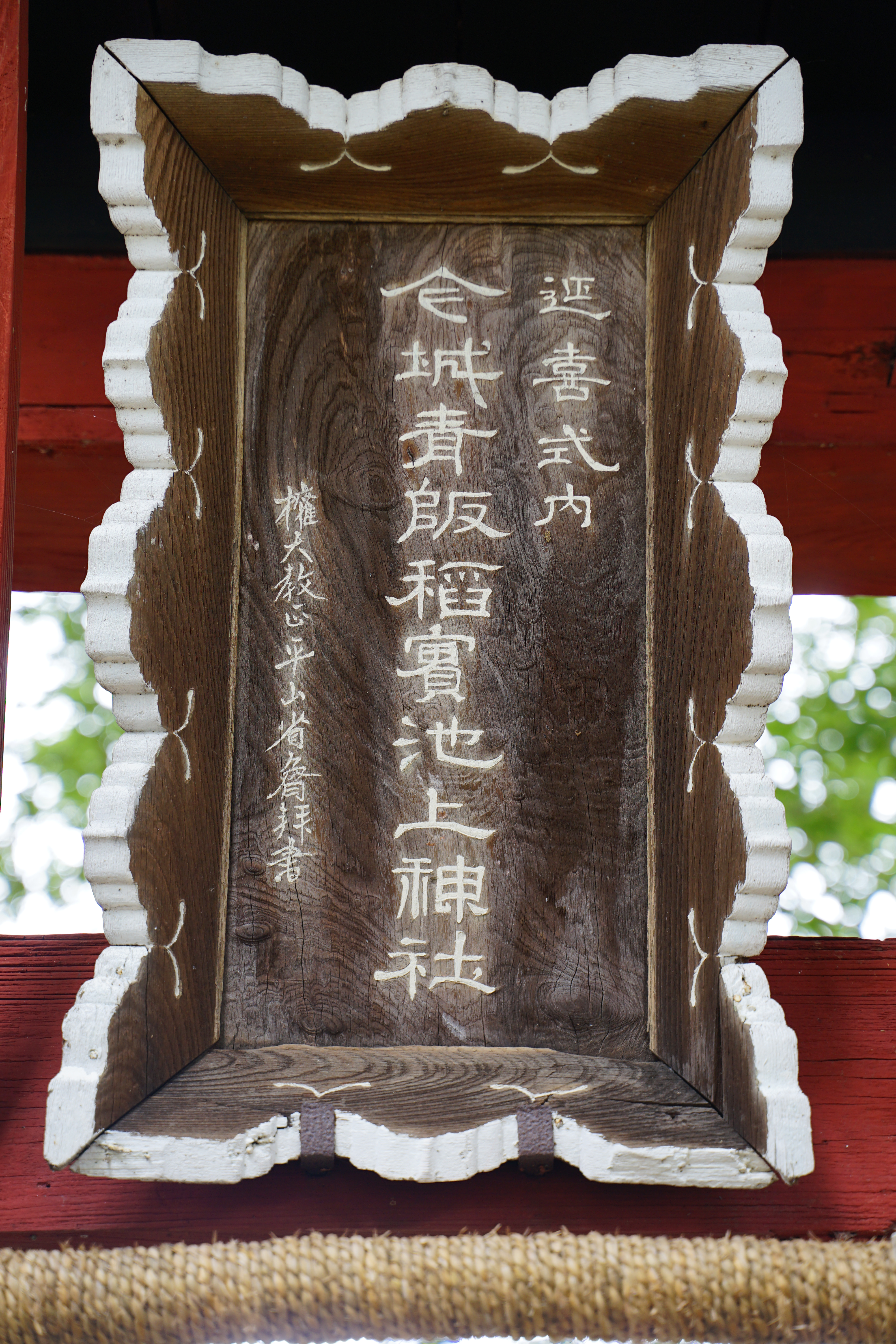 埼玉県上里町 今城青八坂稲実神社の一の鳥居の扁額